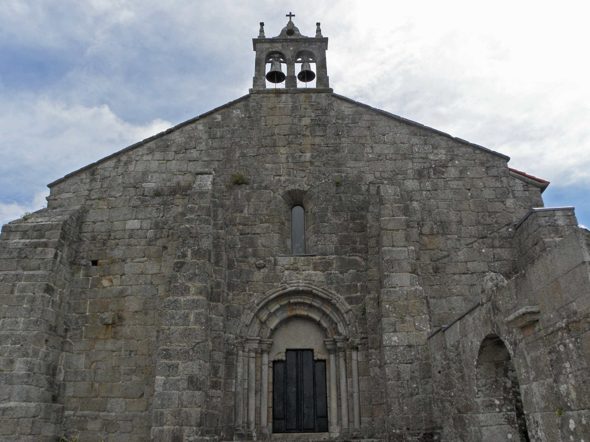 Esta foto participa en el juego En otro lugar de Flickr. Si no perteneces al grupo, no contestes, por favor. Si quieres contestar, únete